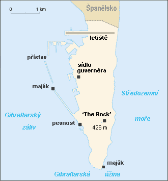 Mapa Gibraltaru Zdroj: CIA World Factbook (PD) ( české popisky zpracoval -jkb- licence: PD